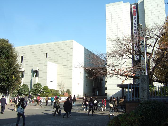 駒澤大学 本部棟